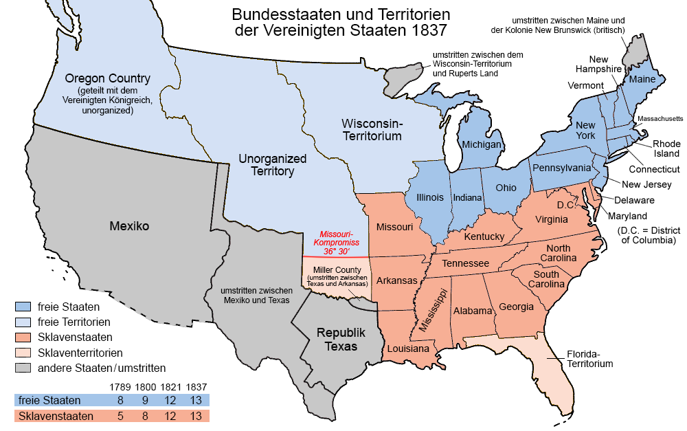 Karte der freien und der sklavenhaltenden Bundesstaaten und Territorien der Vereinigten Staaten 1837. In New Jersey blieben einige Menschen bis 1865 versklavt.